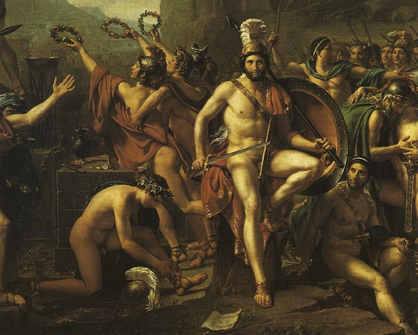 detail